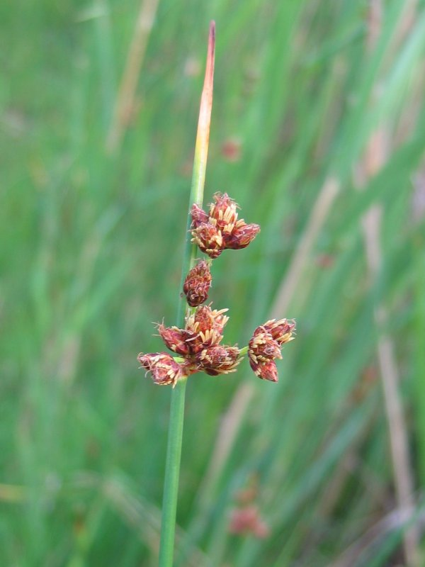 Salz-Teichbinse Schoenoplectus tabernaemontani, Zingst